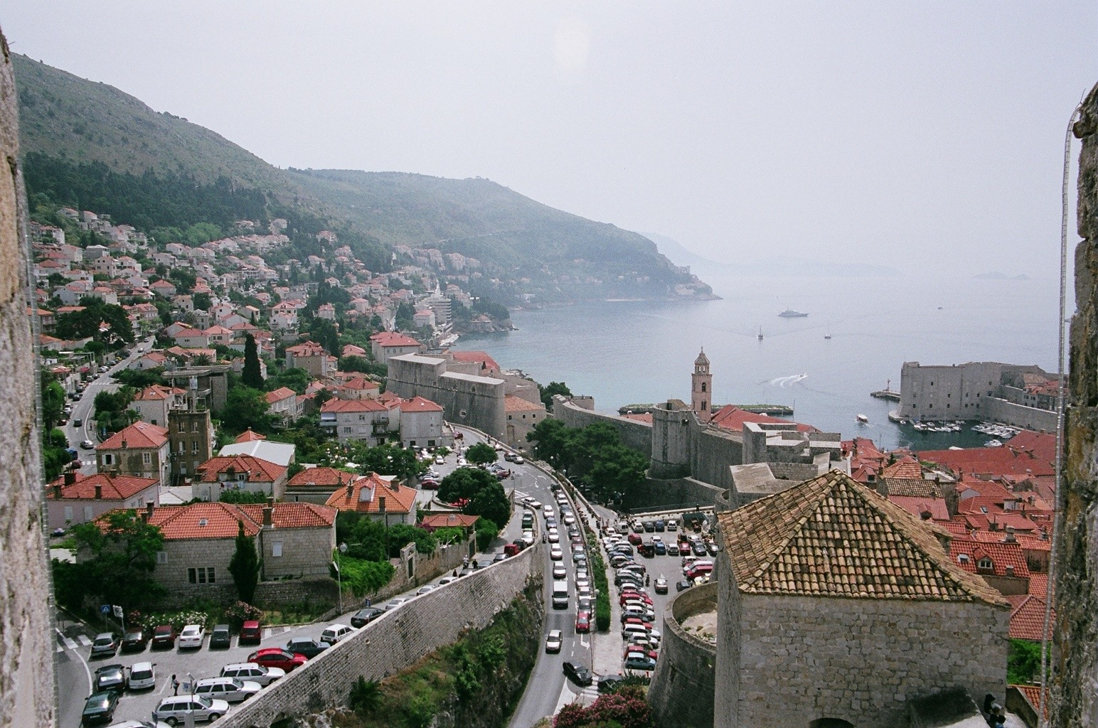 View of Dubrovnik